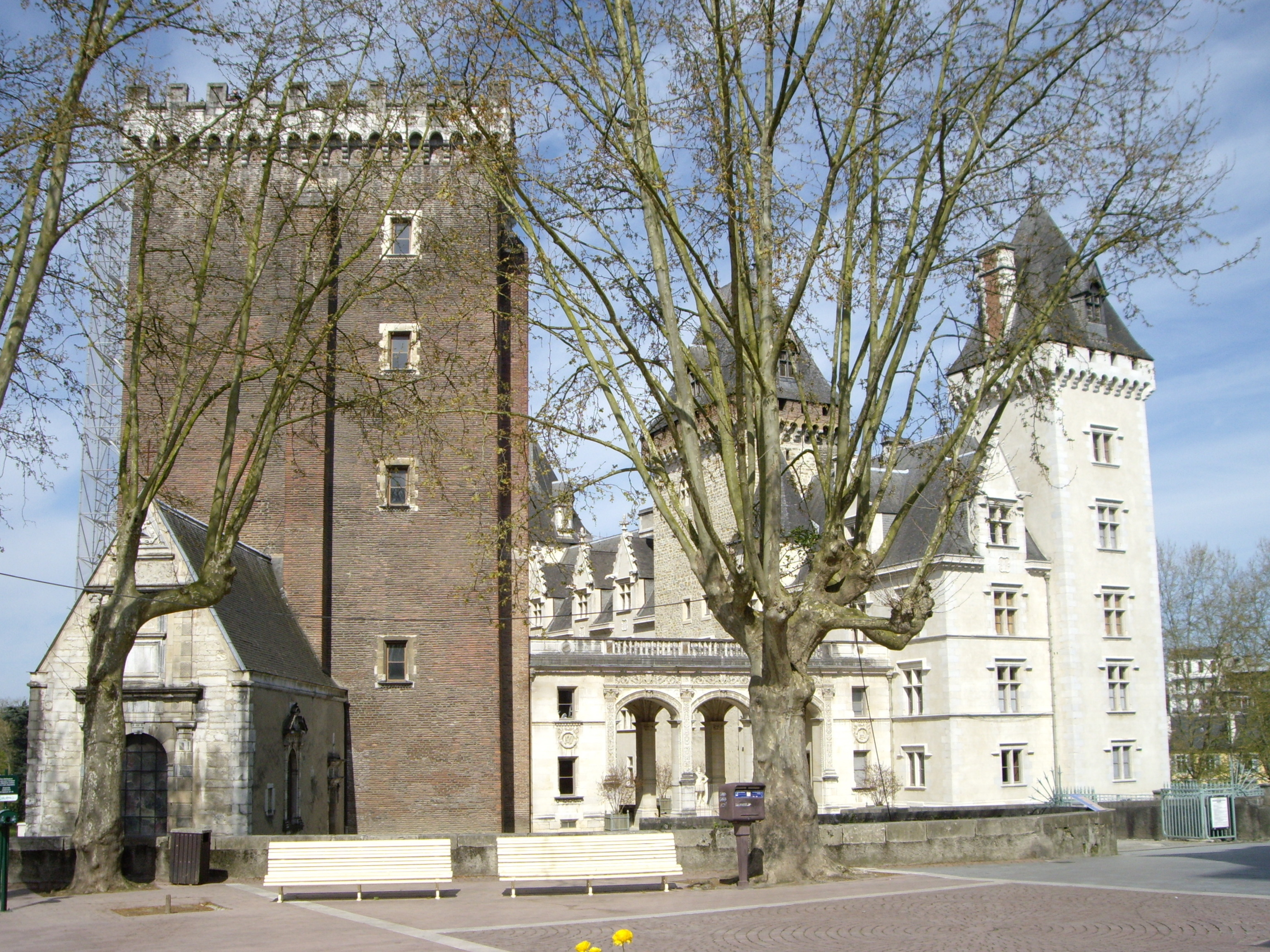 Château de Pau (64)